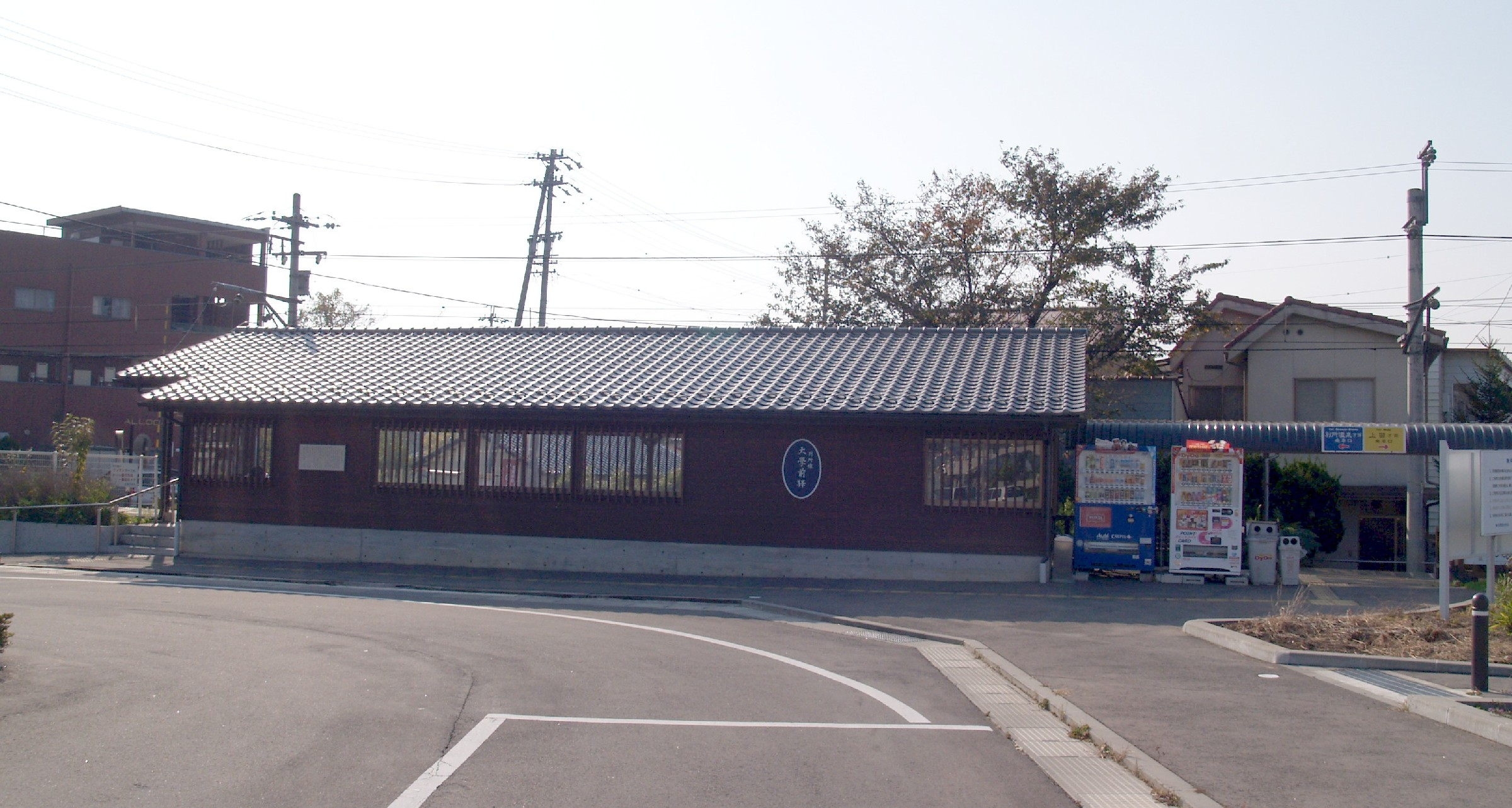 大学前駅